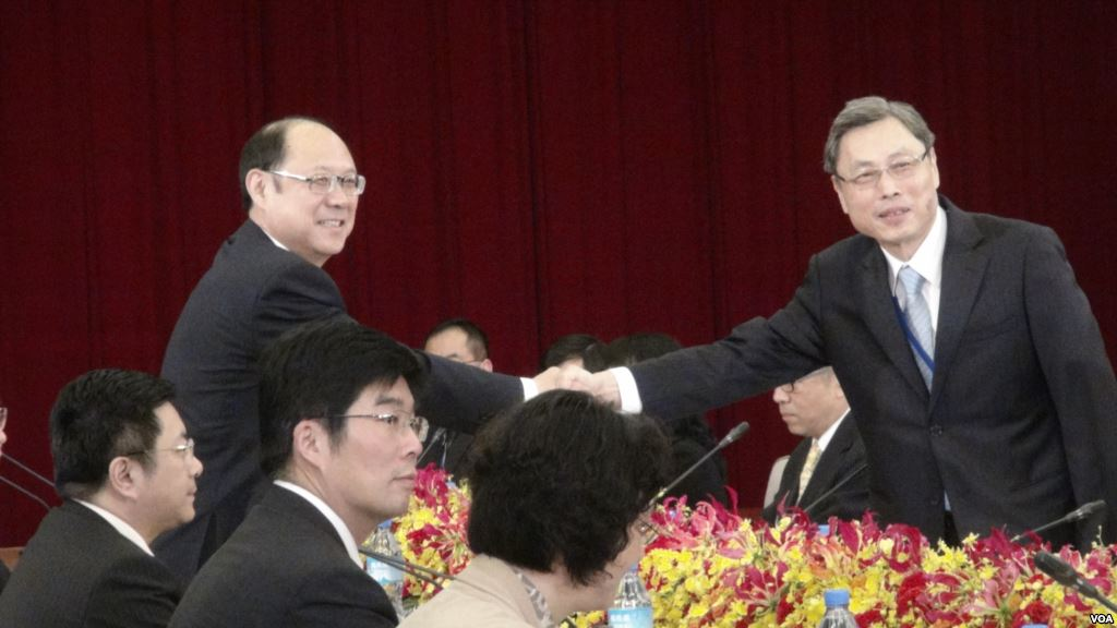 海峽交流基金會與海峽兩岸關係協會雙方代表握手致意。